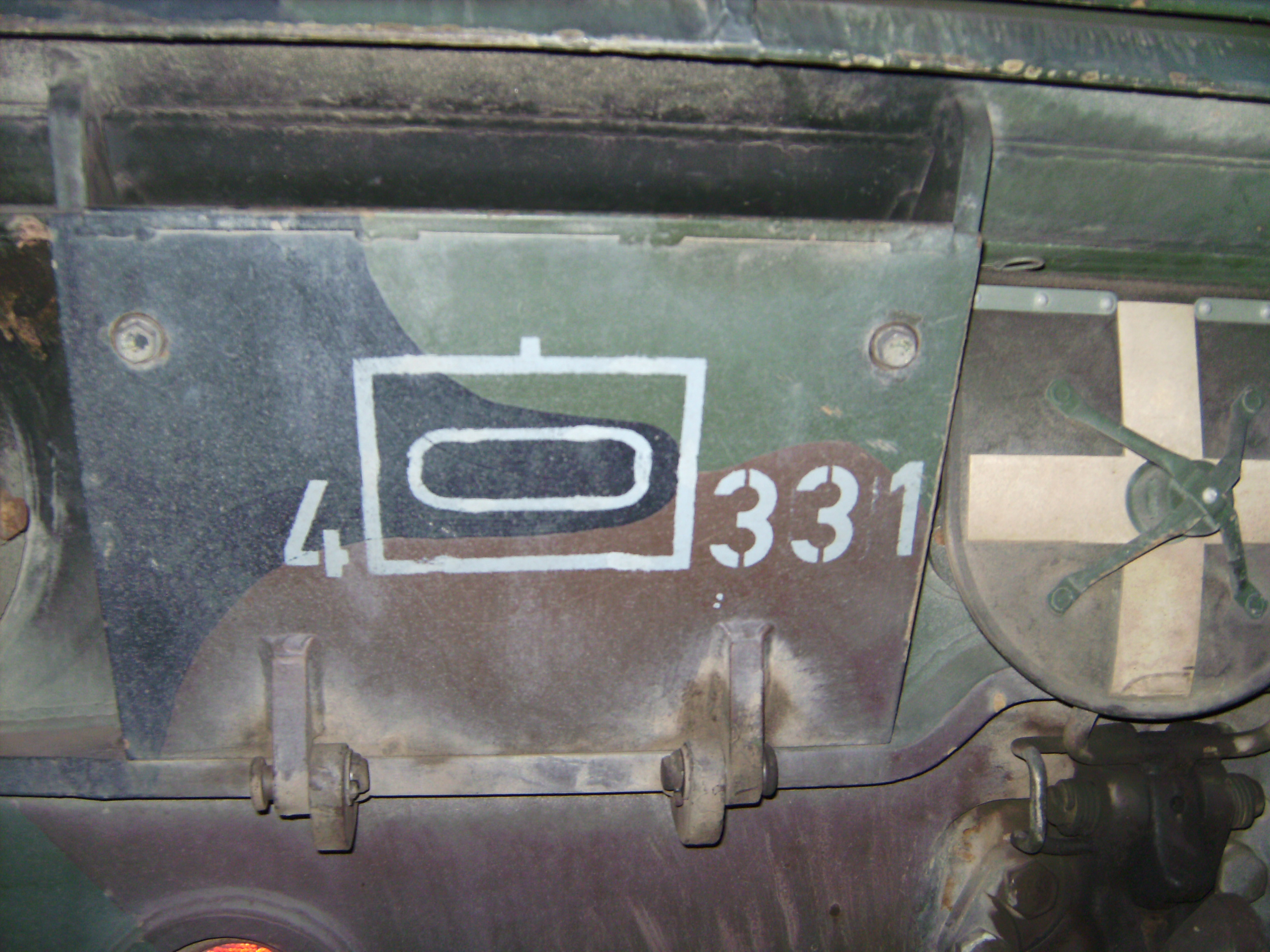 Taktisches Zeichen des 4./PzBtl 331 (4. Kompanie des Panzer Bataillon 331)